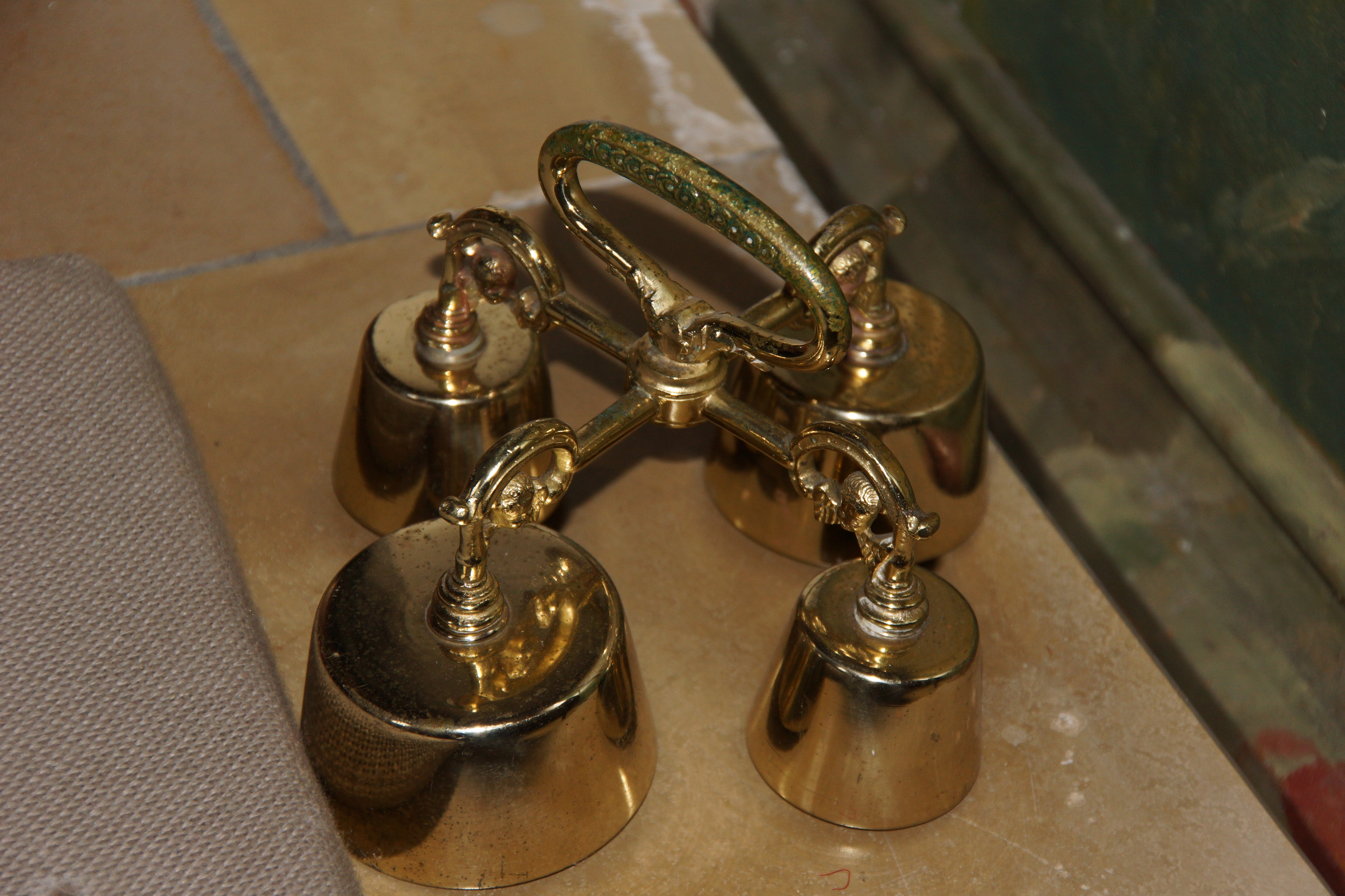 Die Katholische Filialkirche St. Georg in Loderbach, Gemeinde Berg bei Neumarkt